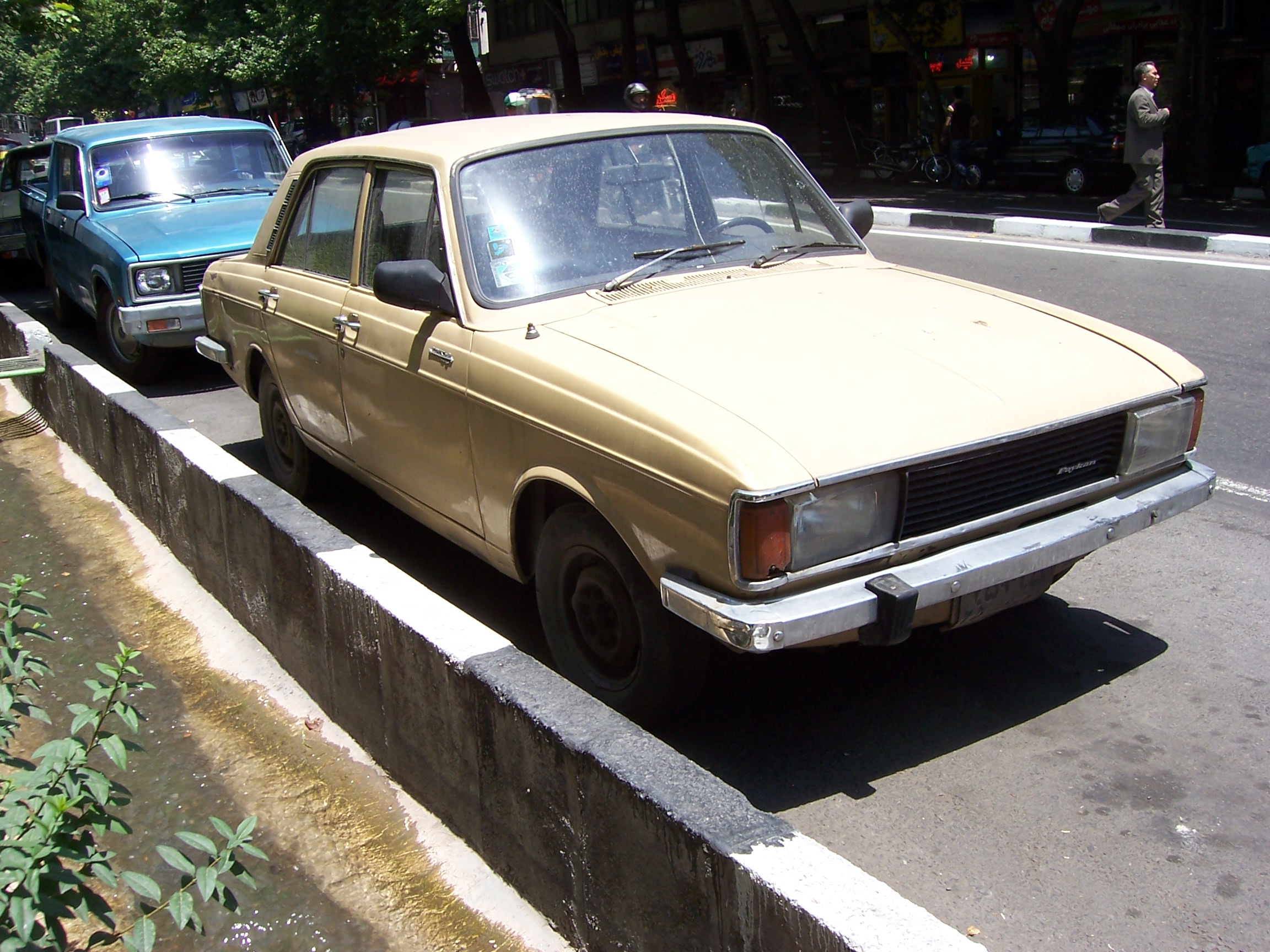 Gelber Paykan